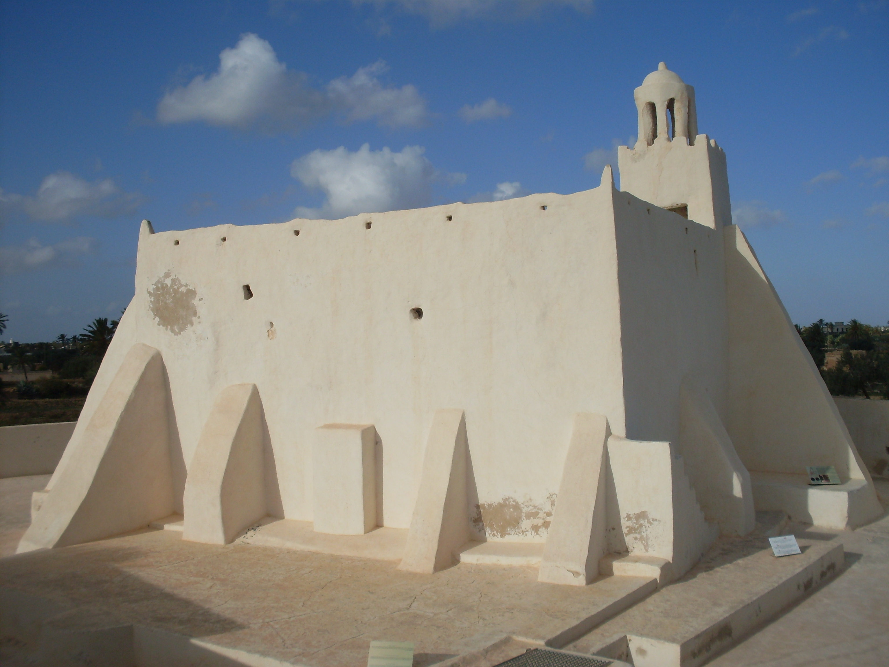 Tunisie, Djerba, Jemaa Fadhloun, vue externe